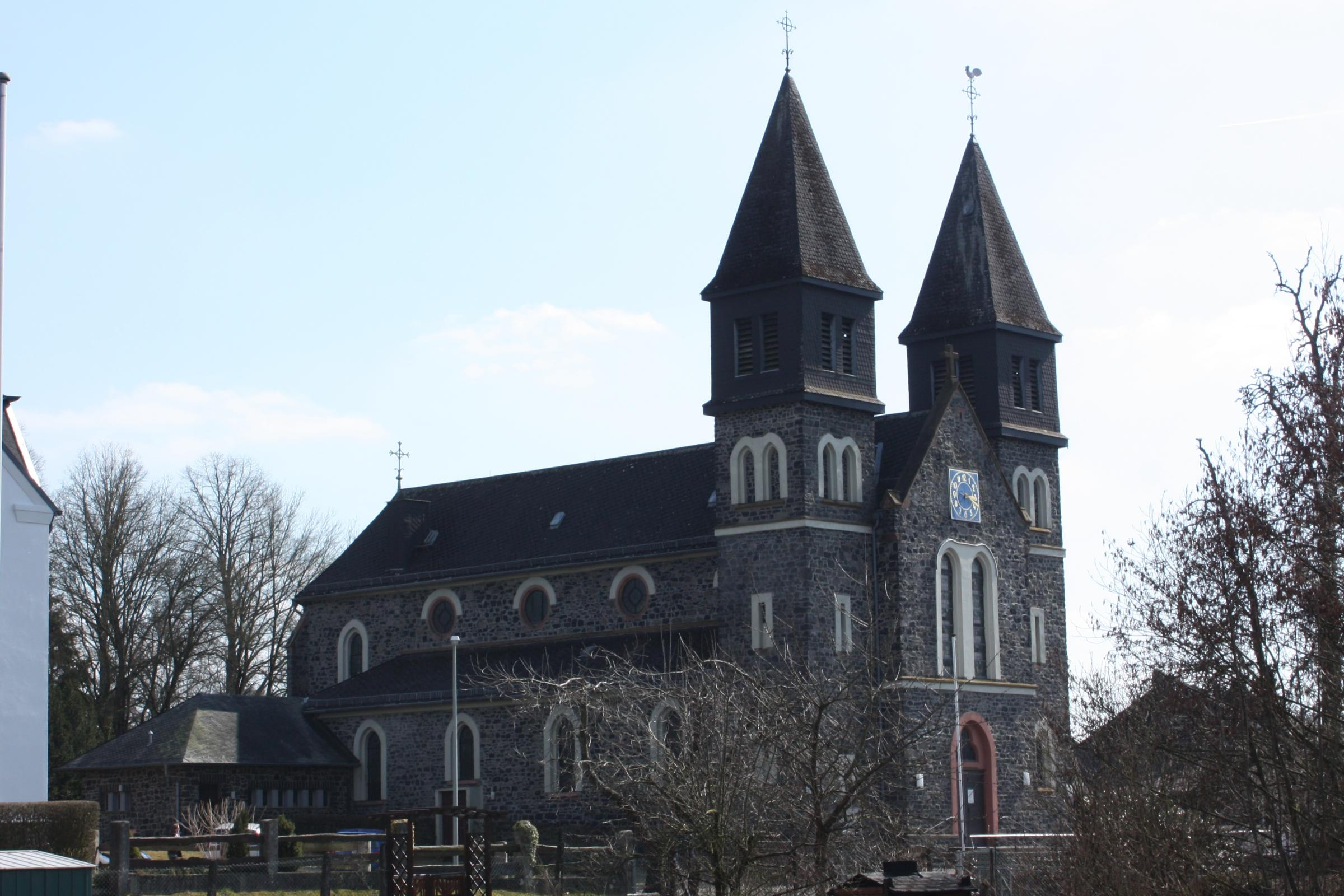 Die katholische Pfarrkirche St. Laurentius in Hausen, Westerwald (Waldbrunn), Hessen, Deutschland. Erbaut 1871.